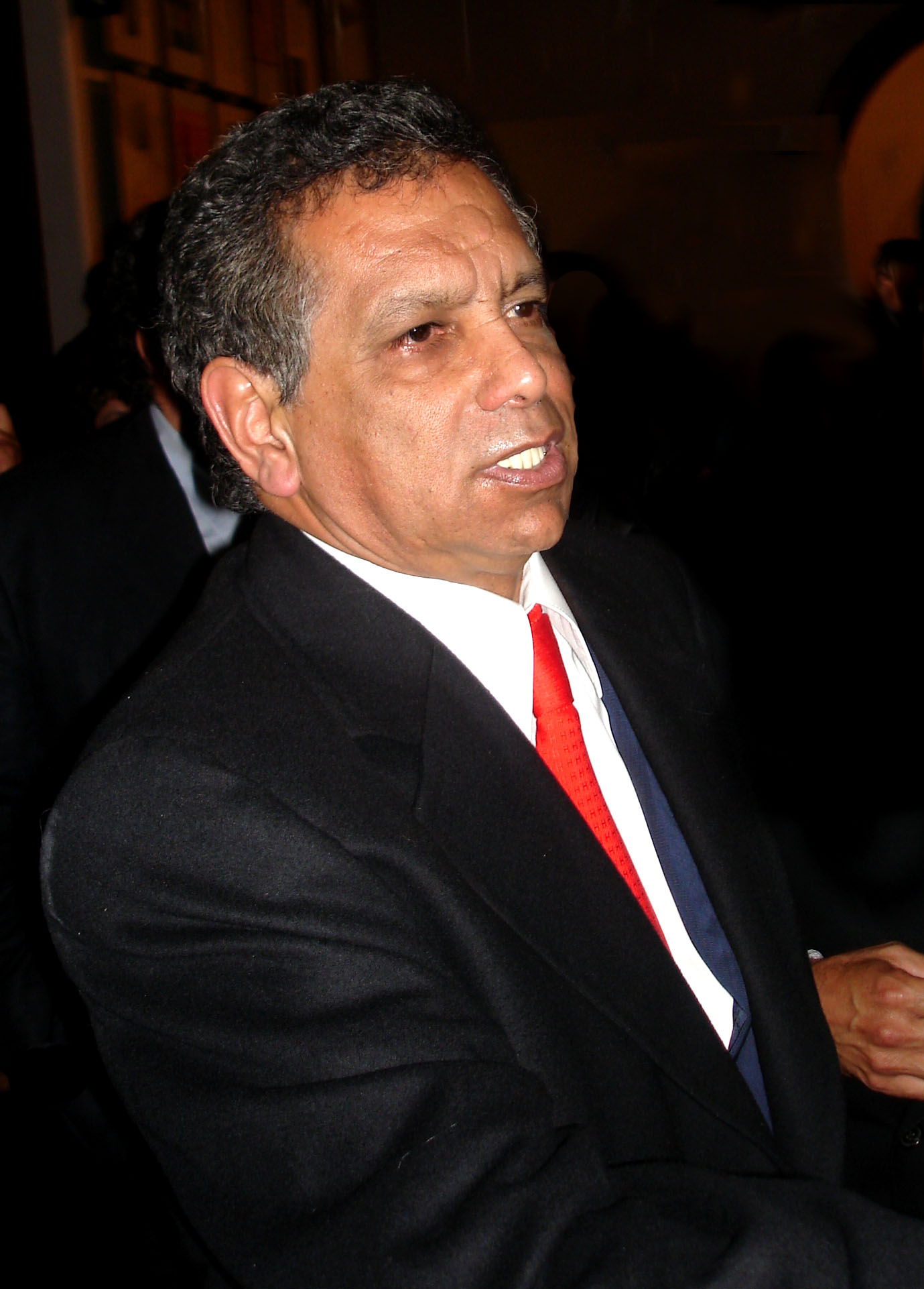 Foto de Fidel Herrera Beltrán